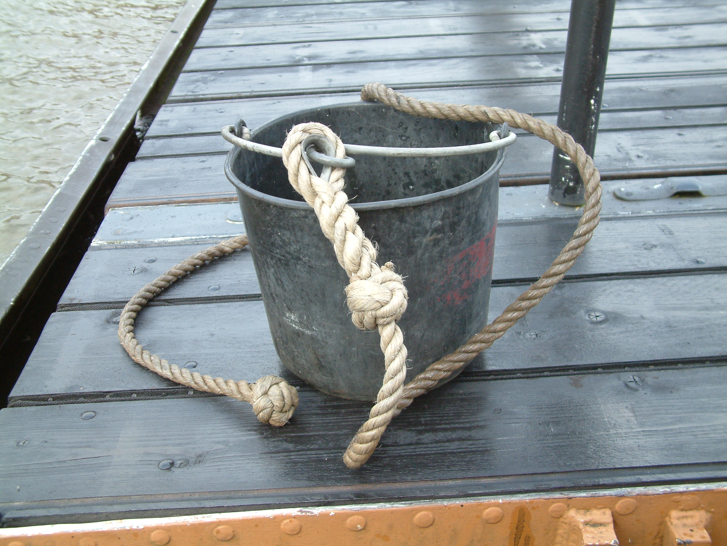 Puts